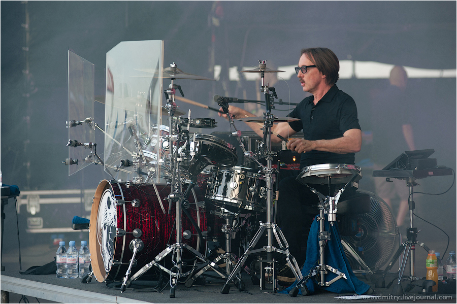 Бутч Виг, группа Garbage, фестиваль "Рок над Волгой" 2012